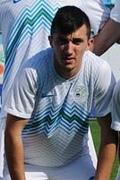 Молодіжна збірна Словенії у фіналі Турніру пам'яті Валерія Лобановського 2015